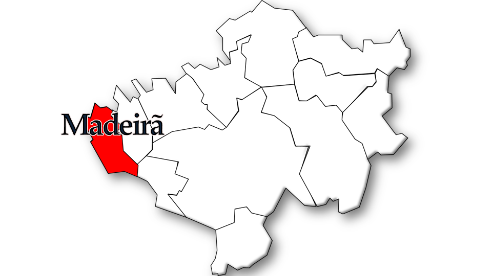 População